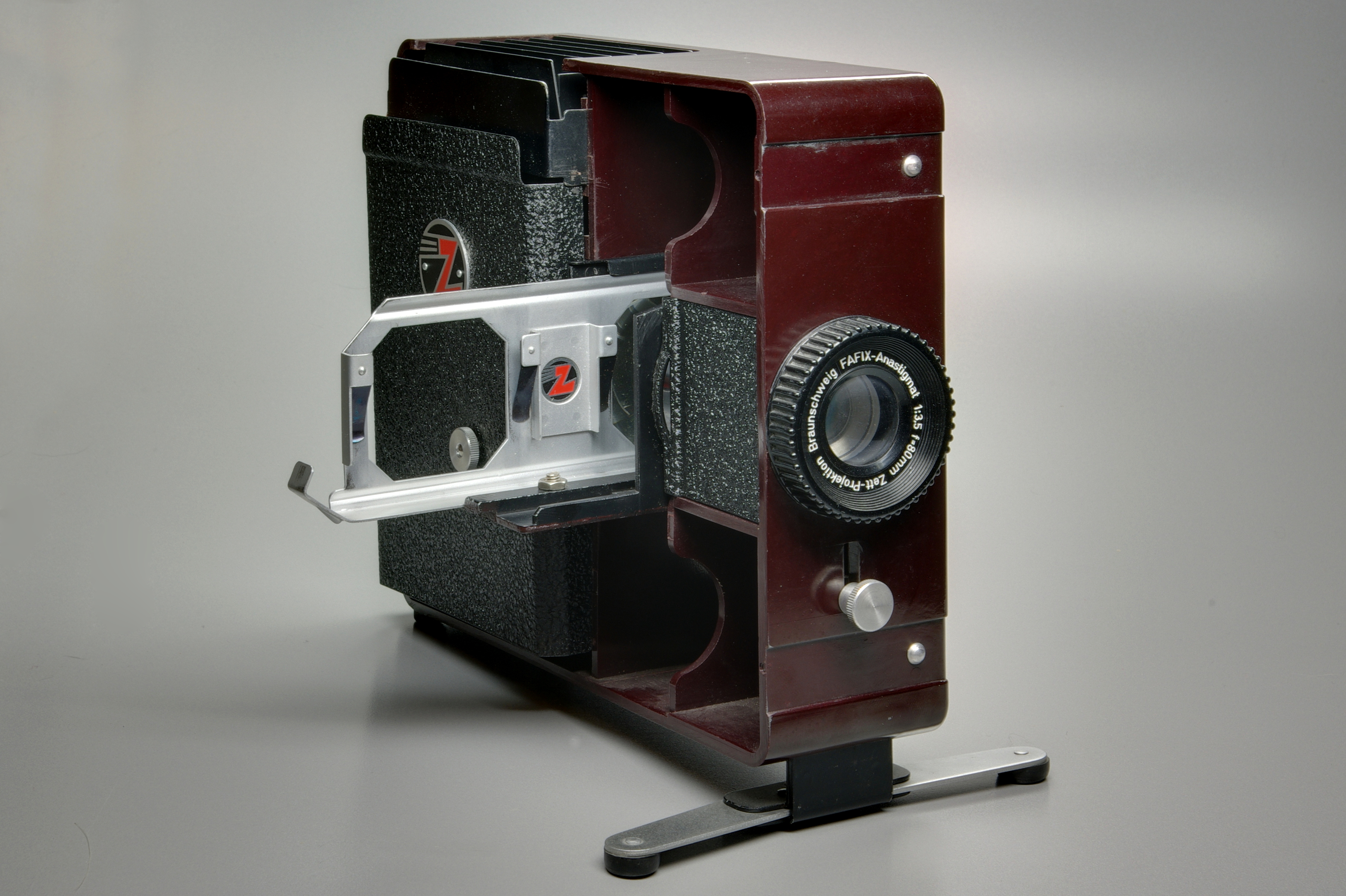 Zett Fafix Diaprojektor